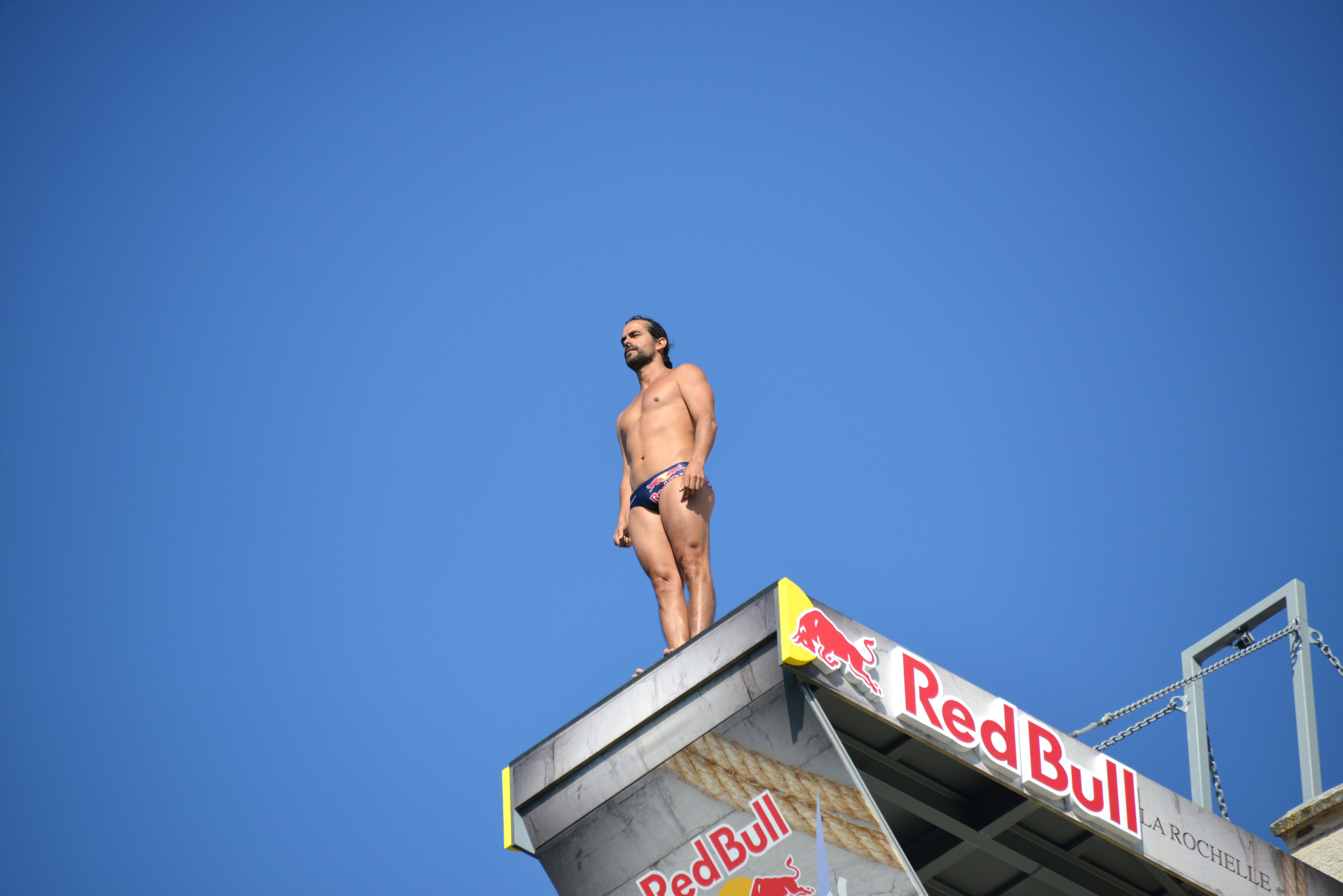 Le plongeur de haut vol Orlando Duque (Colombie). Red Bull Cliff Diving World Series 2016, l' étape de La Rochelle. La Rochelle, Charente-Maritime, France.